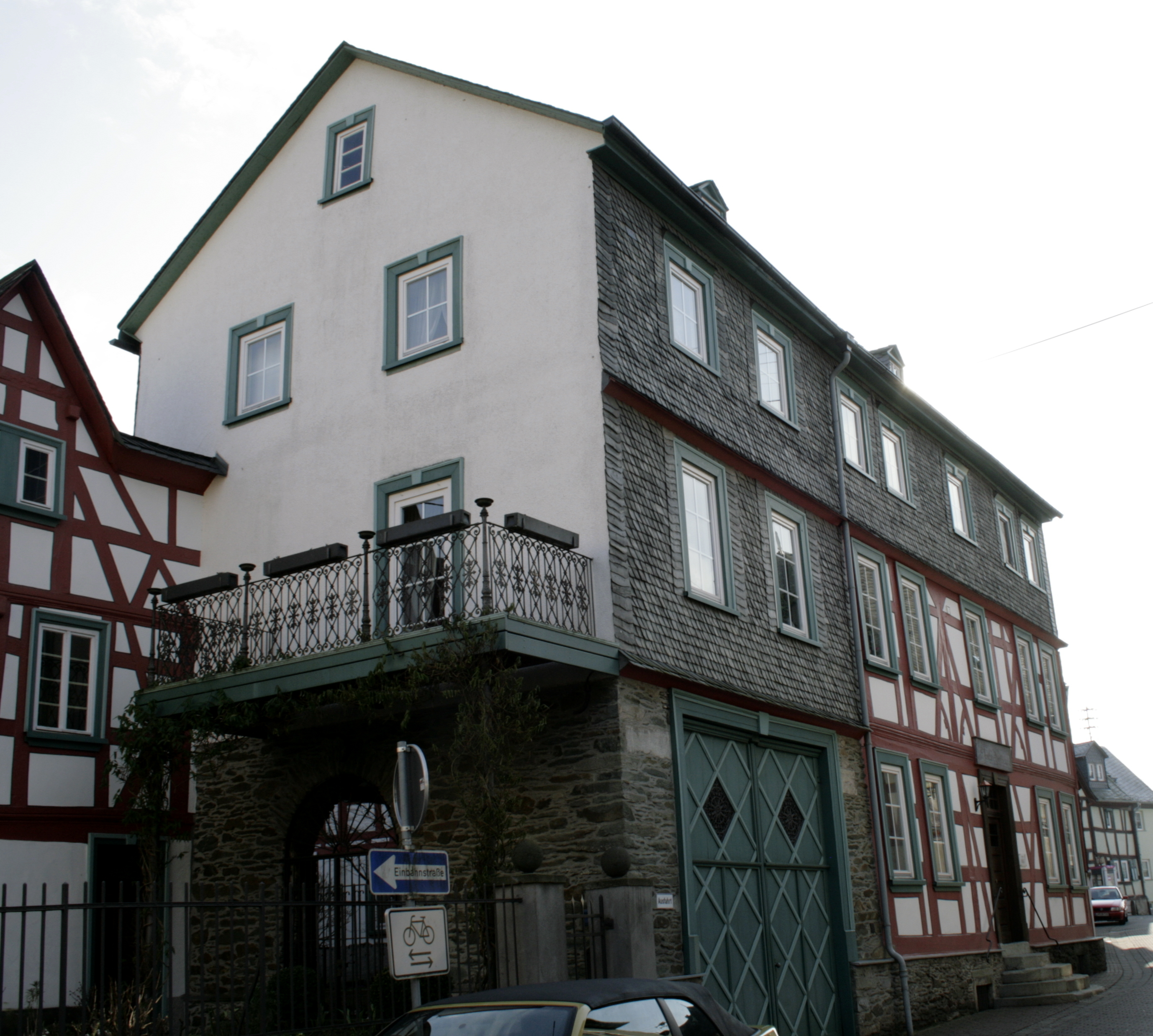 Ehemalige Amtsapotheke in Runkel, Deutschland